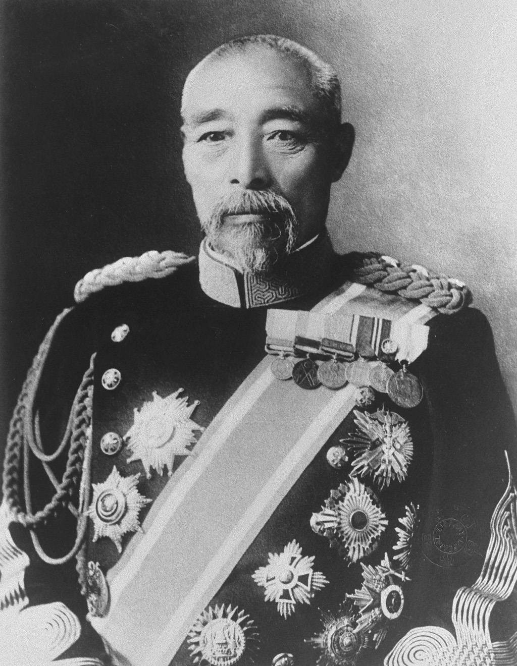 Portrait of Oku Yasukata (奥保鞏, 1847 – 1930)